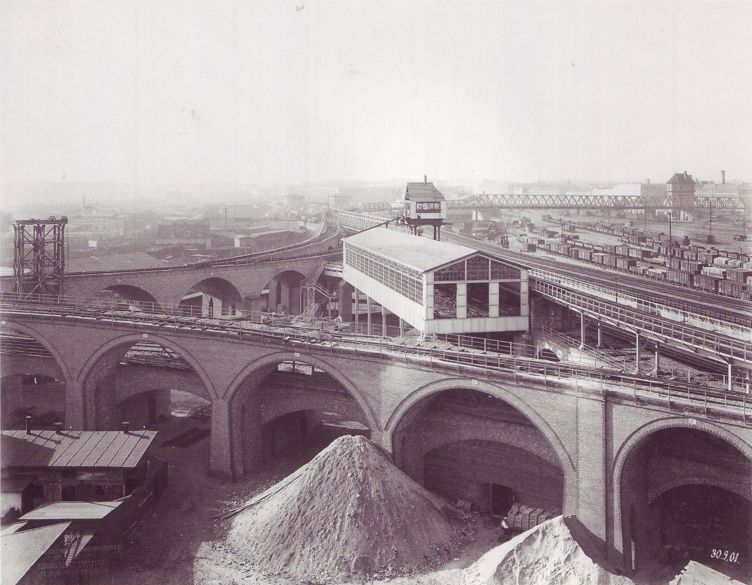 Gleisdreieck (lit.: railroad triangle) under construction, 1901